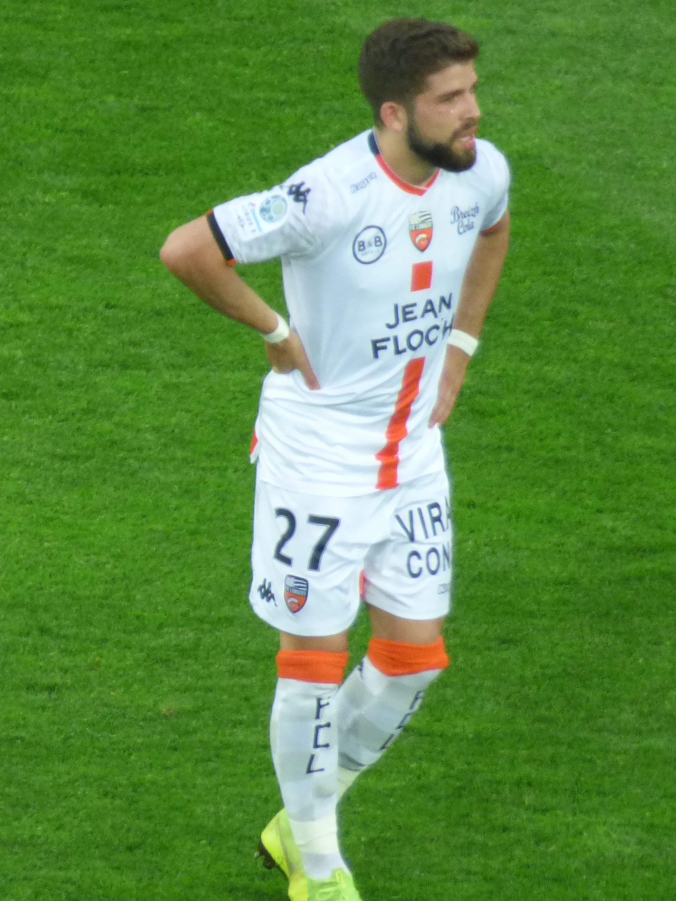 Jimmy Cabot pendant le match RC Lens / FC Lorient, comptant pour la 34ème journée du championnat de France de Ligue 2 de football 2018-2019, le 23 avril 2019, au Stade Bollaert-Delelis.